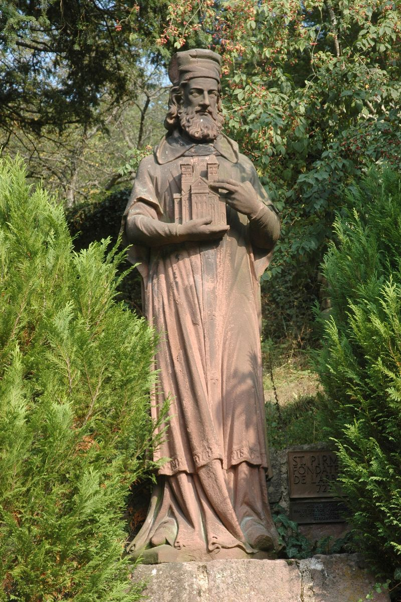 Neumittelalterliches Standbild des Heiligen Pirminius beim Kloster Murbach am Fuß des Großen Belchen im Elsass.